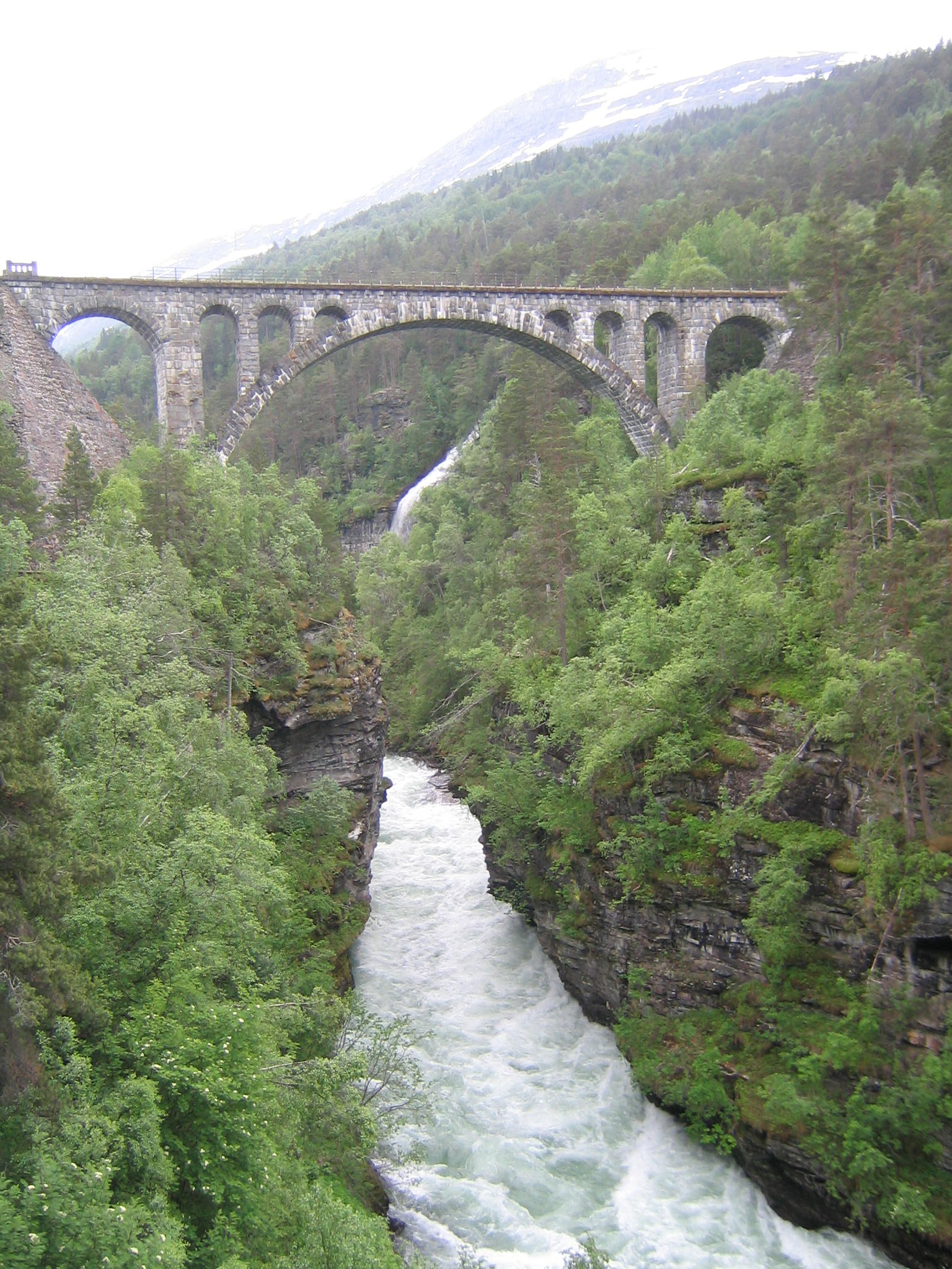 Bilde av Kylling bru på Raumabanen